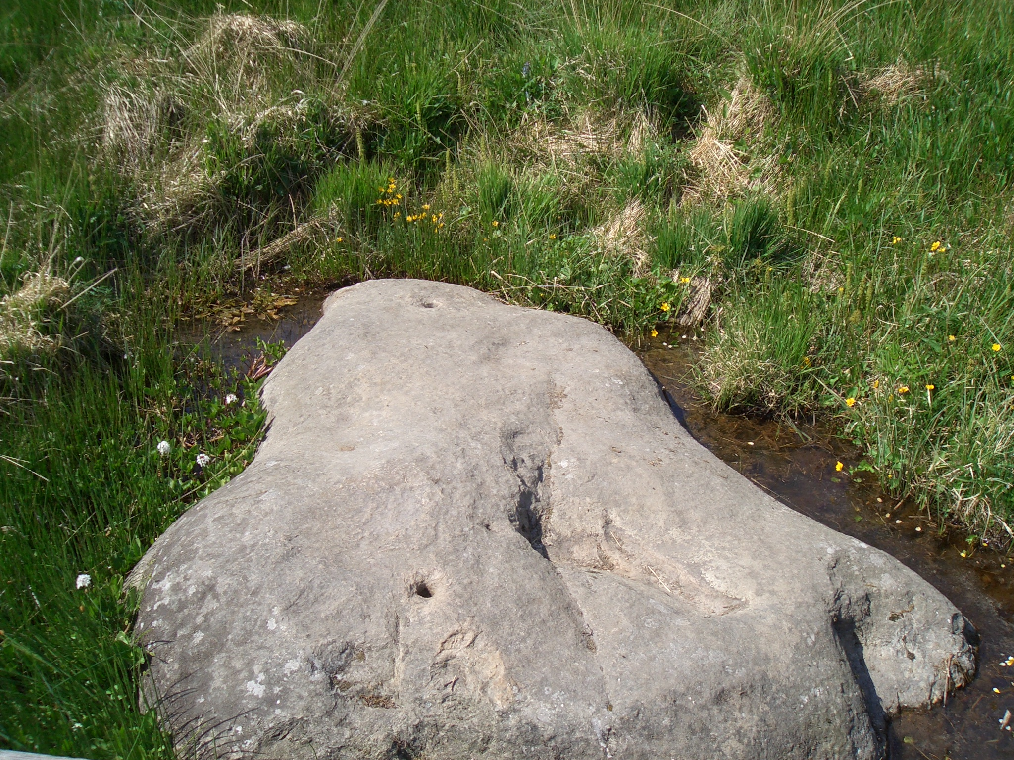 Der Fels „Weißer Stein“ auf dem Berg Weißer Stein (im Moor am „Boxvenn“ etwa 1 km nordwestlich der Bergkuppe auf belgischer Seite, Höhe 660 m NN)